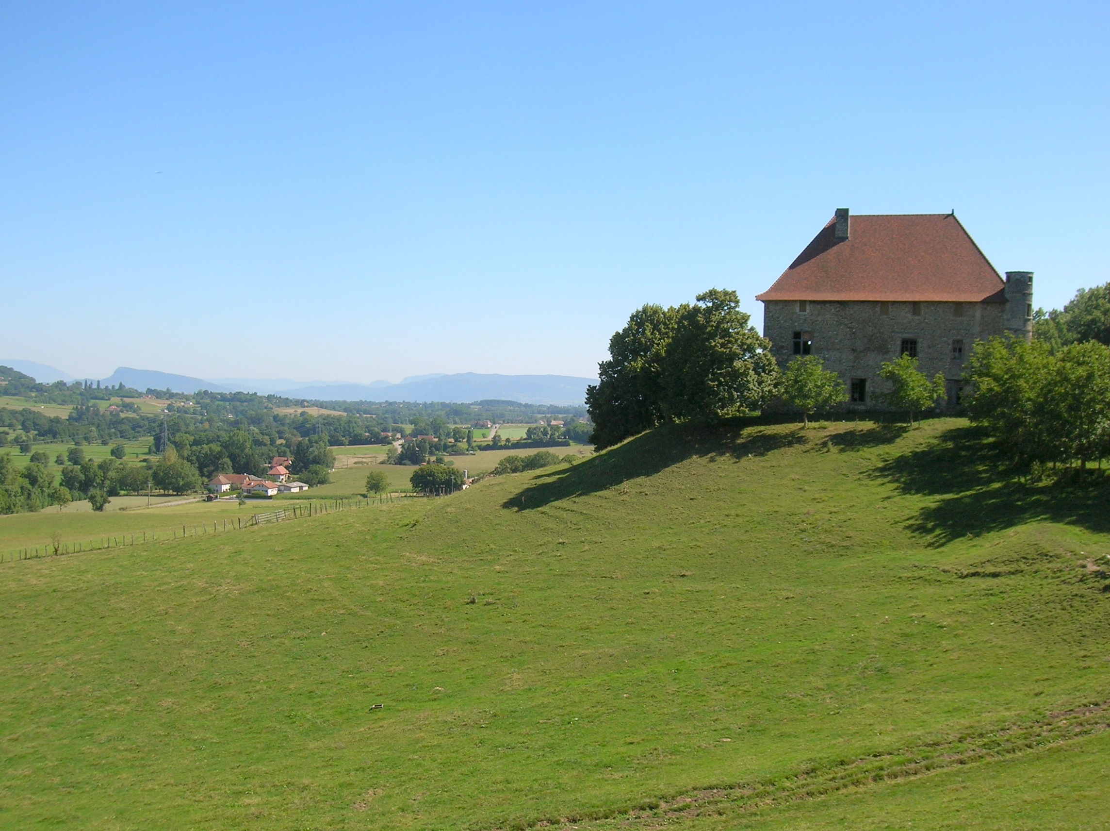 Château de Bellegarde, Chassignieu, Isère, AuRA, France.